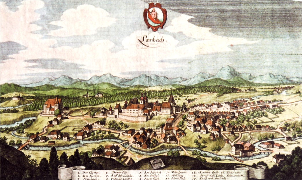 Ansicht der Gemeinde Lambach mit Stift Lambach.